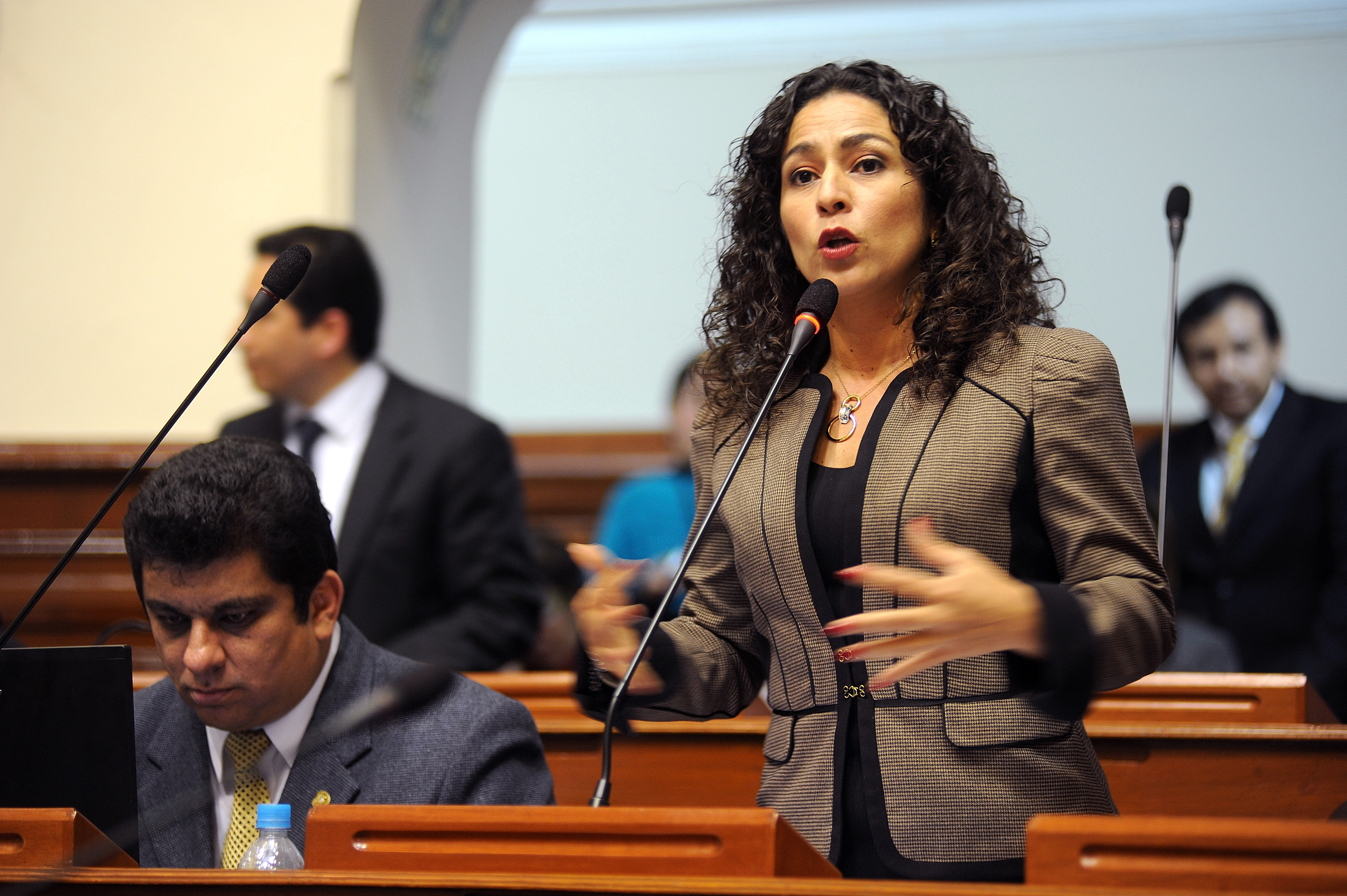 La congresista Cecilia Chacón De Vettori fija su posición en el debate parlamentario realizado esta tarde por el Pleno.